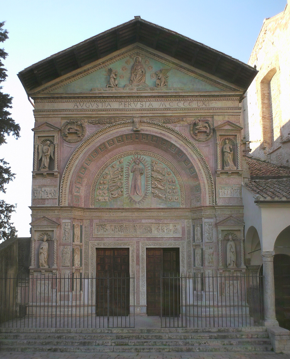 L'Oratorio di San Bernardino a Perugia è stato realizzato alla metà del XV secolo dal fiorentino Agostino di Duccio.